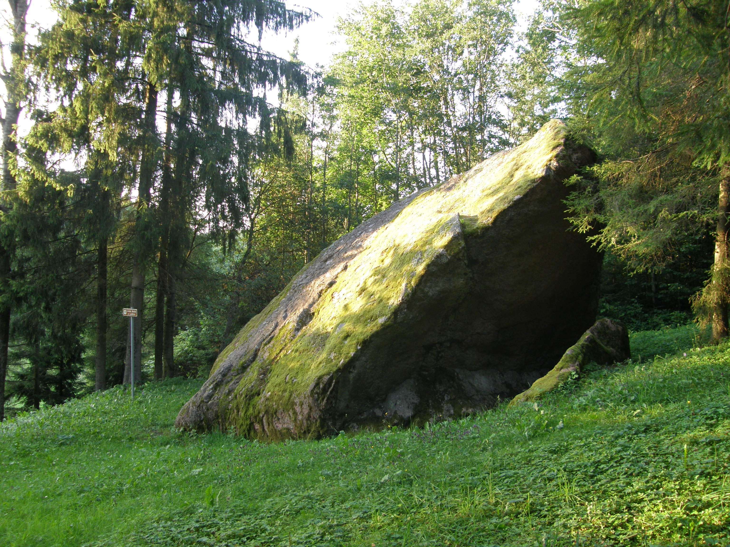 Linda-Neitsi kivi.